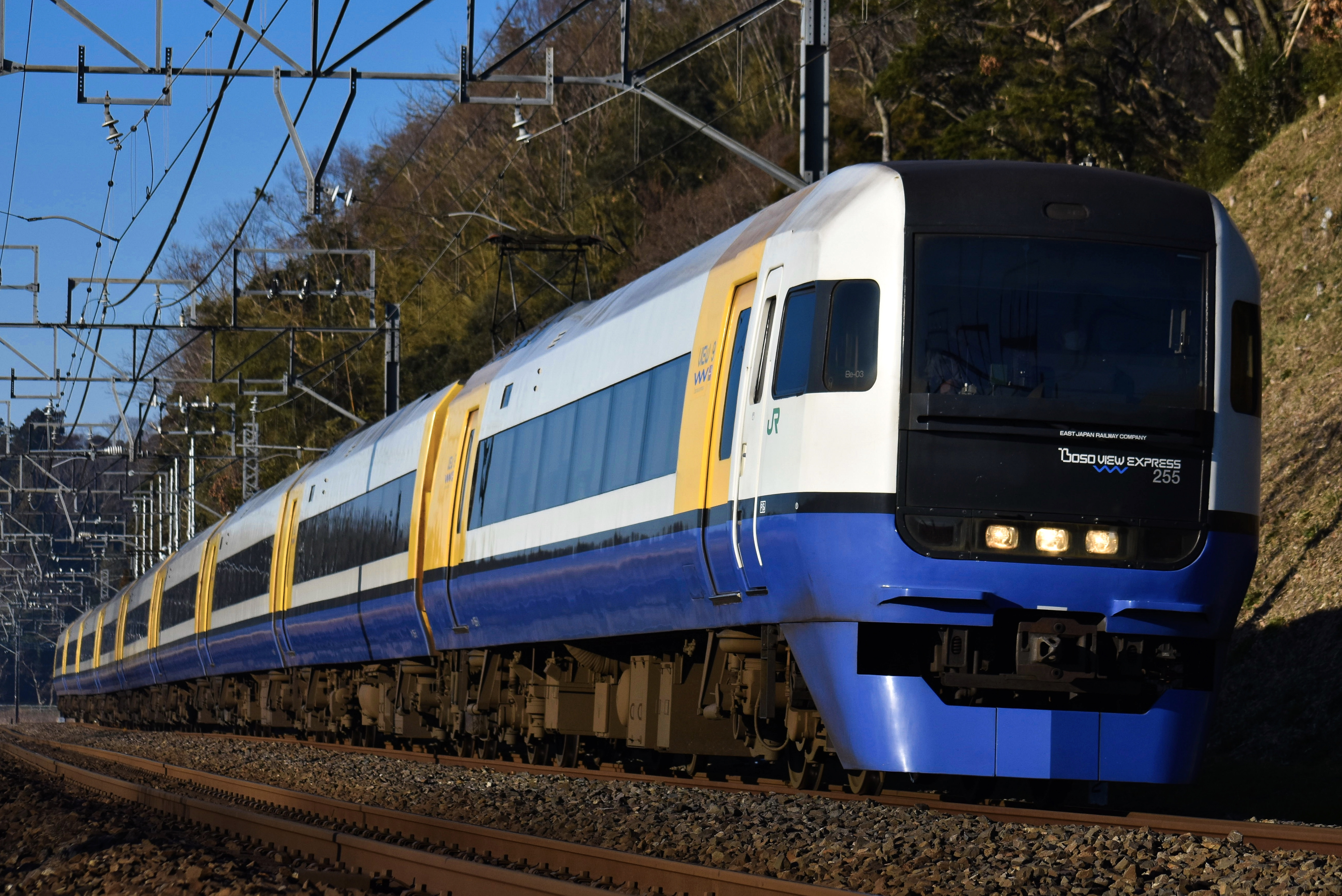 日本某所にて撮影